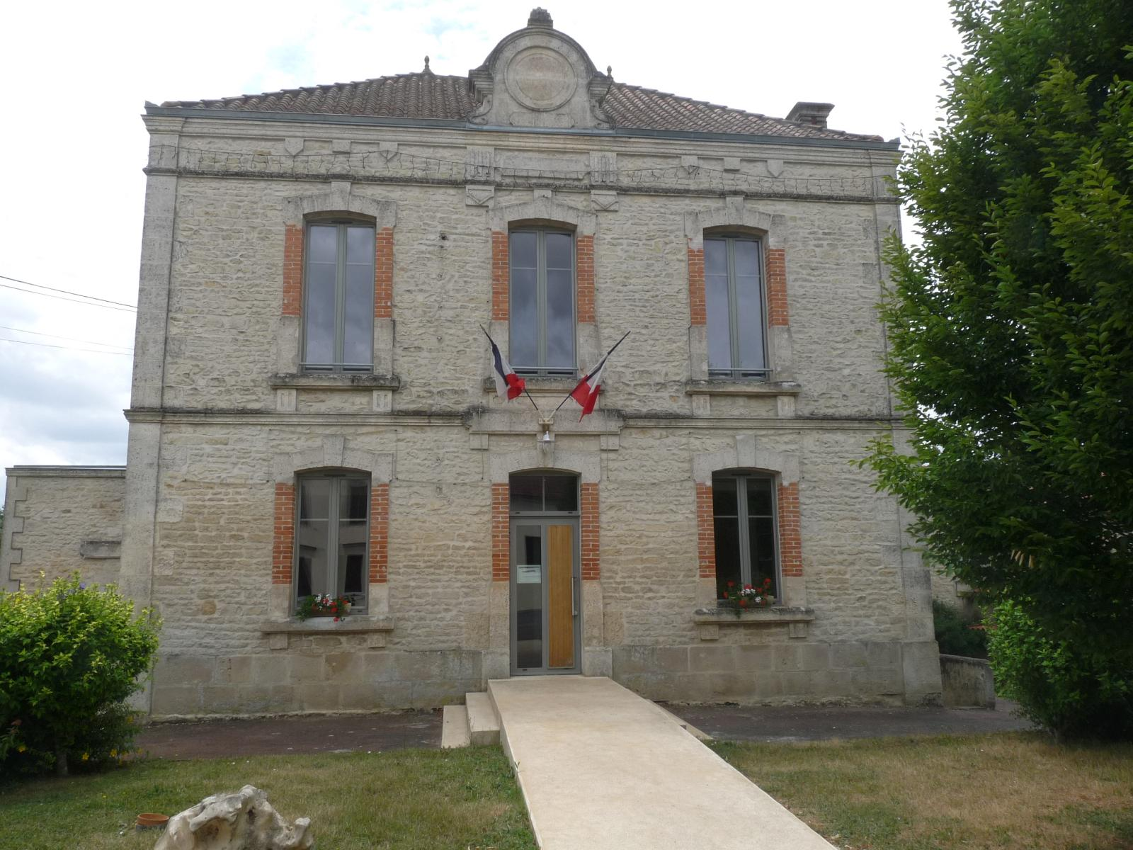 Mairie de Tuzie (16), France